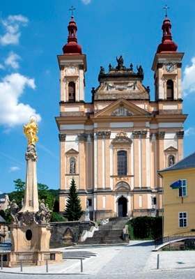 Chrám Zvěstování panny Marie Šternberk